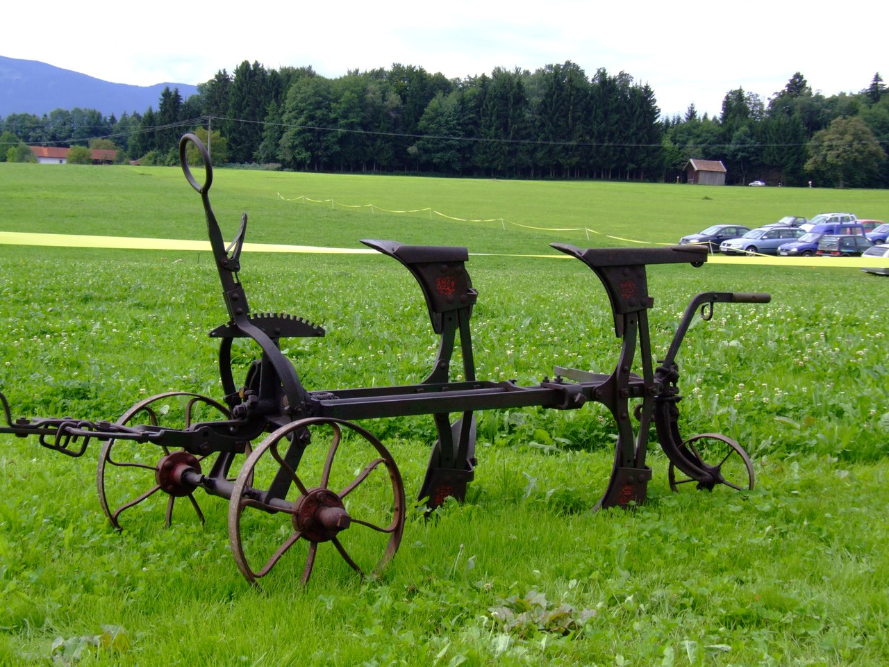 Pflug KZW5 der Pflugfabrik Gebrüder Eberhardt, Ulm/Donau, Deutschland